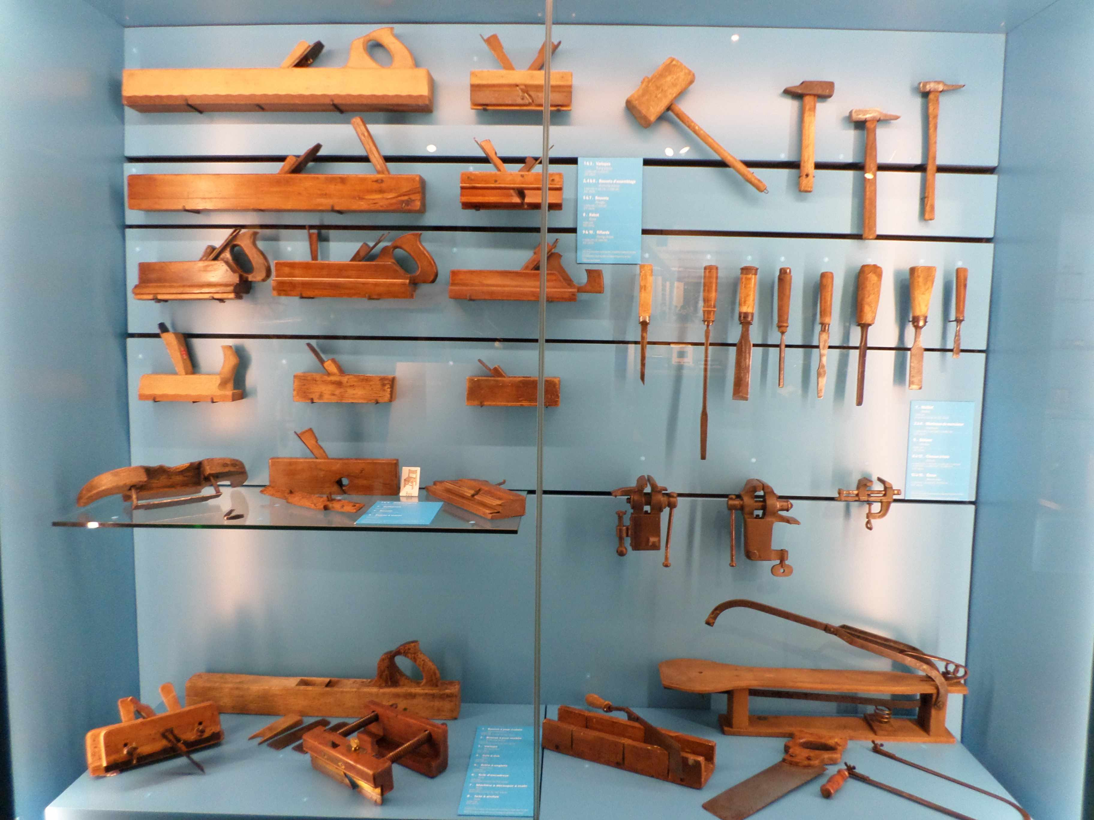 rabot